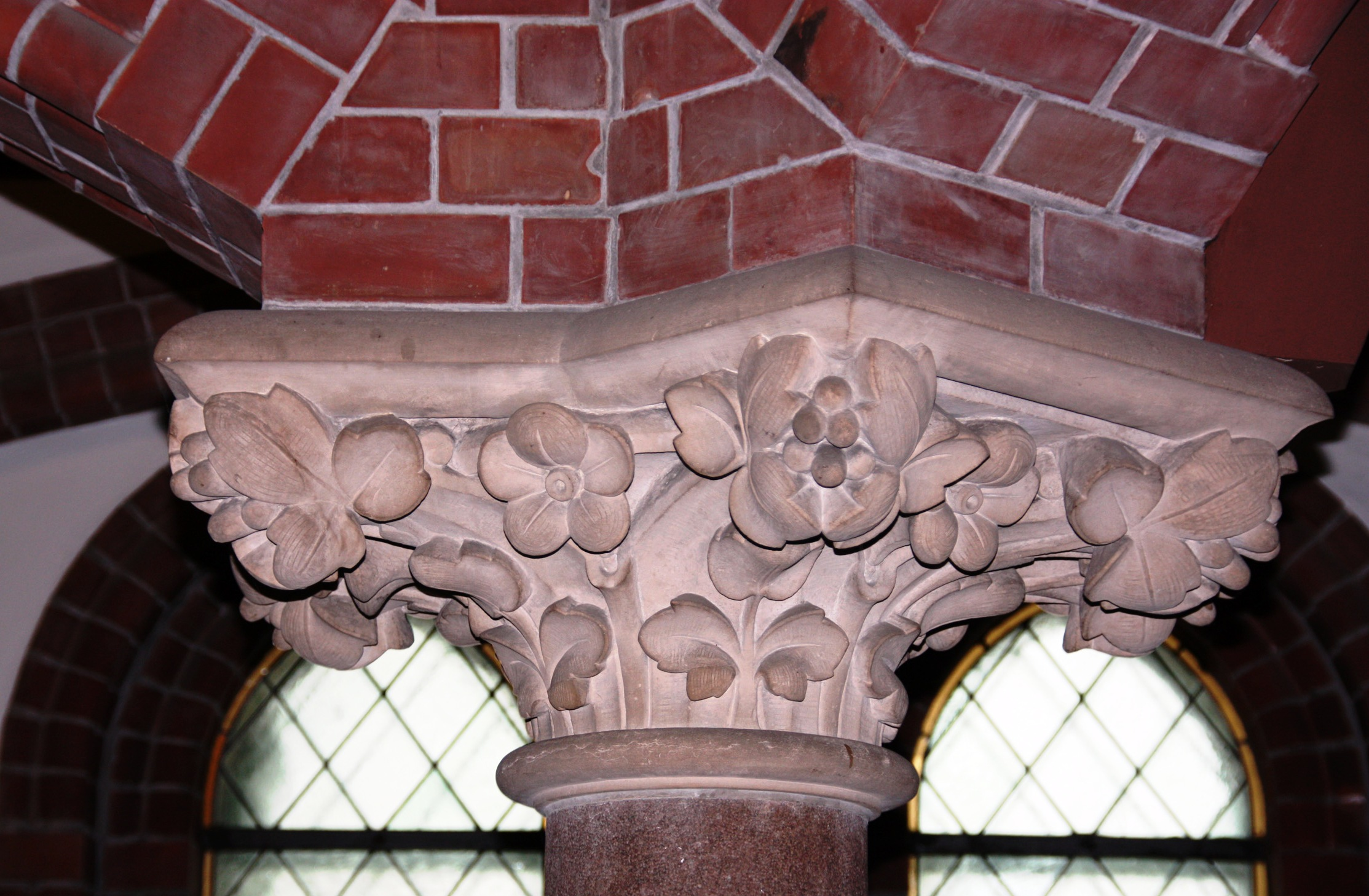 Detaljer fra søylene i Trefoldighetskirken i Arendal